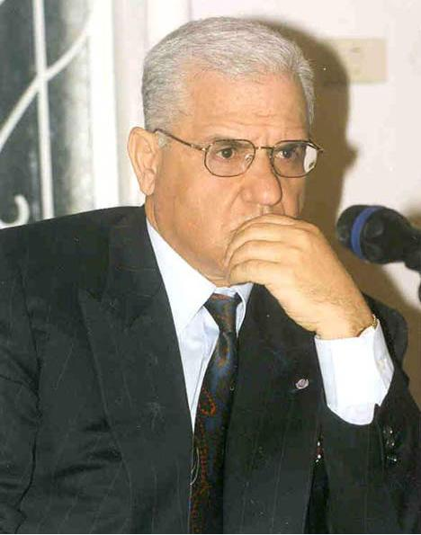 Portrait de M. Sadok Chaabane